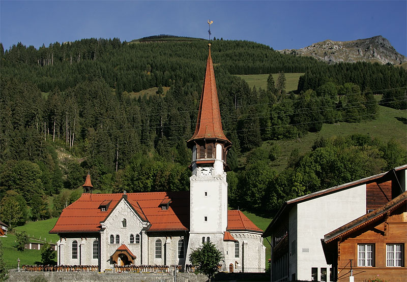 Die neue Kirche von Jaun